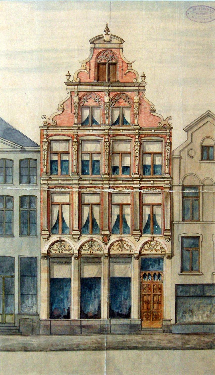 Ontwerp voor de Steenstraat 25 in Brugge; oorspronkelijke tekening door de architect Louis Delacenserie (1838-1909)